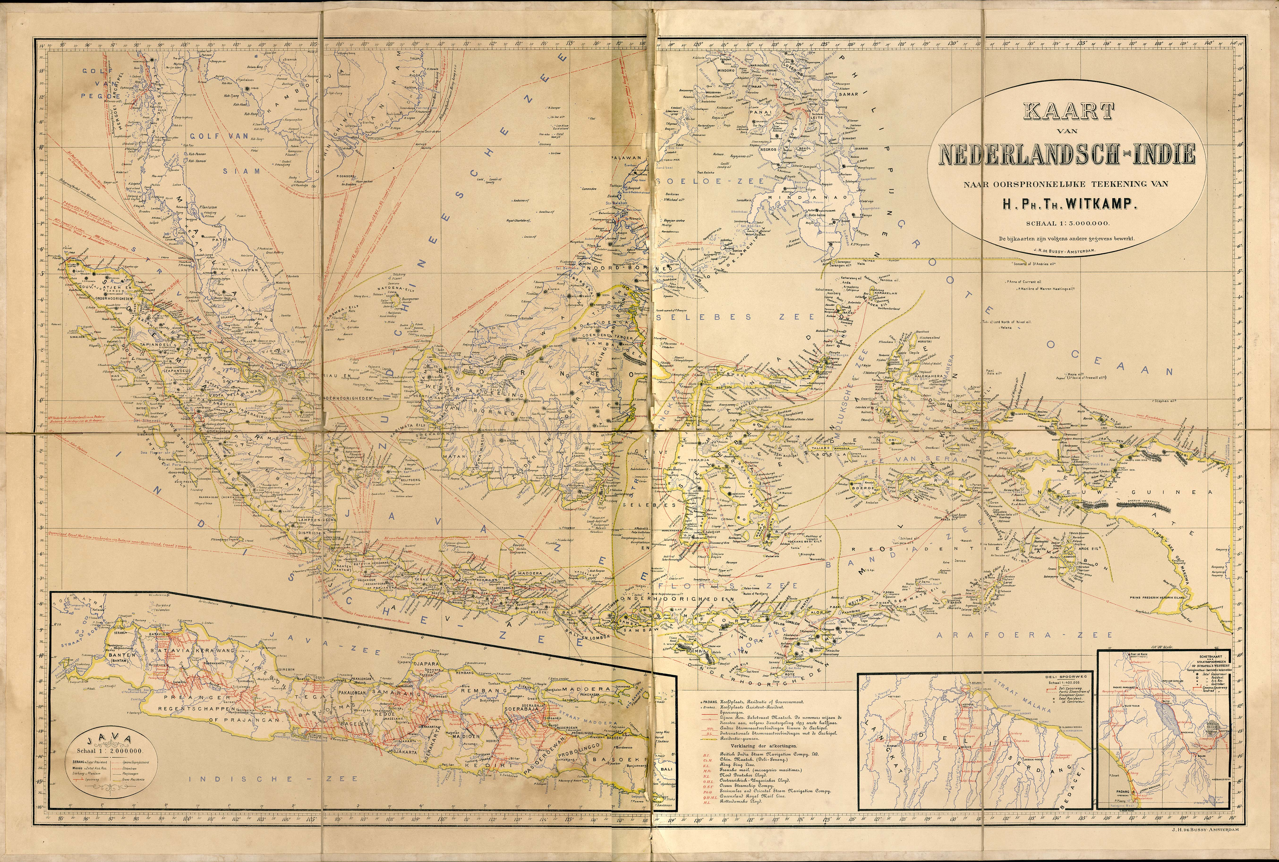 ""Kaart van Nederlandisch-Indie naar oorspronkelijke teekening van H. Ph. Th. Witkamp", J.H. deBussy, Amsterdam, ca. 1893." - van